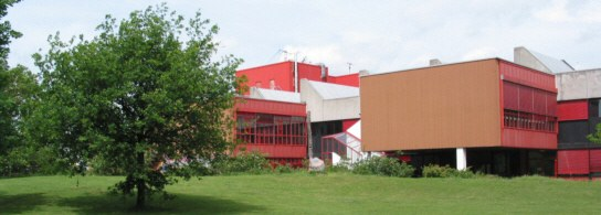 Aktuelle Außenansicht der HEMS